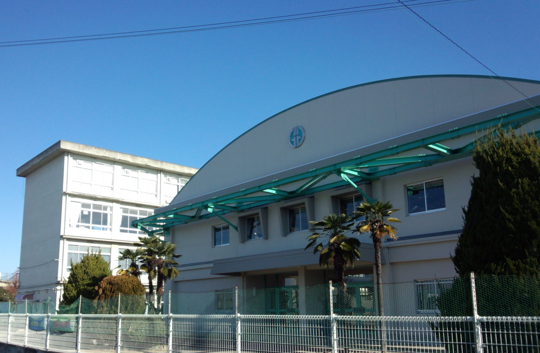 加古川市立野口北小学校